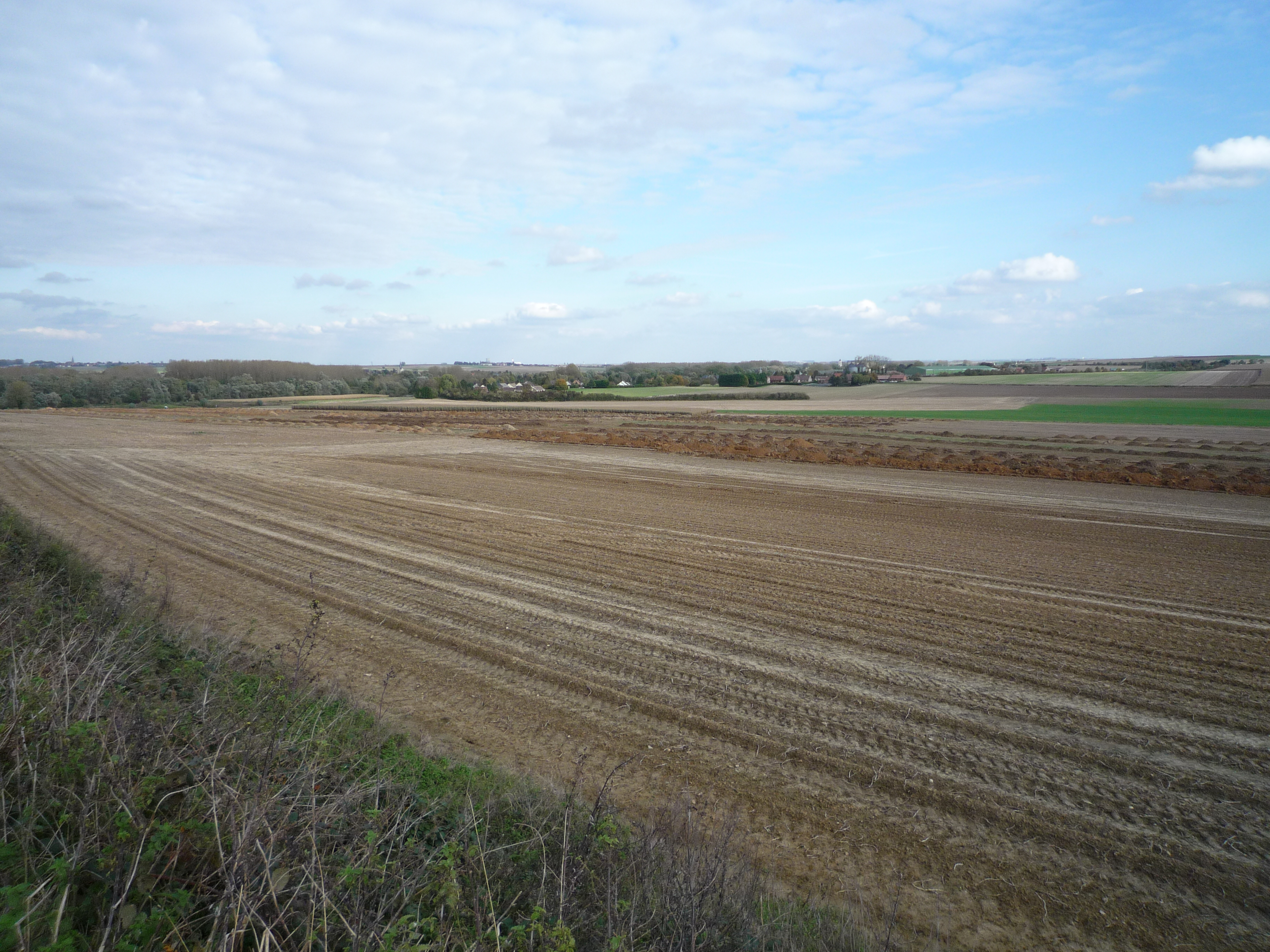 Description Fouilles archéologiques diagnostics sur le trajet du canal Seine-Nord Europe en octobre 2008. En arrière plan, le village d'Aubencheul-au-Bac Date18 October 2008SourceOwn workAuthorNom (P@d@w@ne) Fouilles archéologiques diagnostics sur le trajet du canal Seine-Nord Europe en octobre 2008. En arrière plan, le village d'Aubencheul-au-Bac